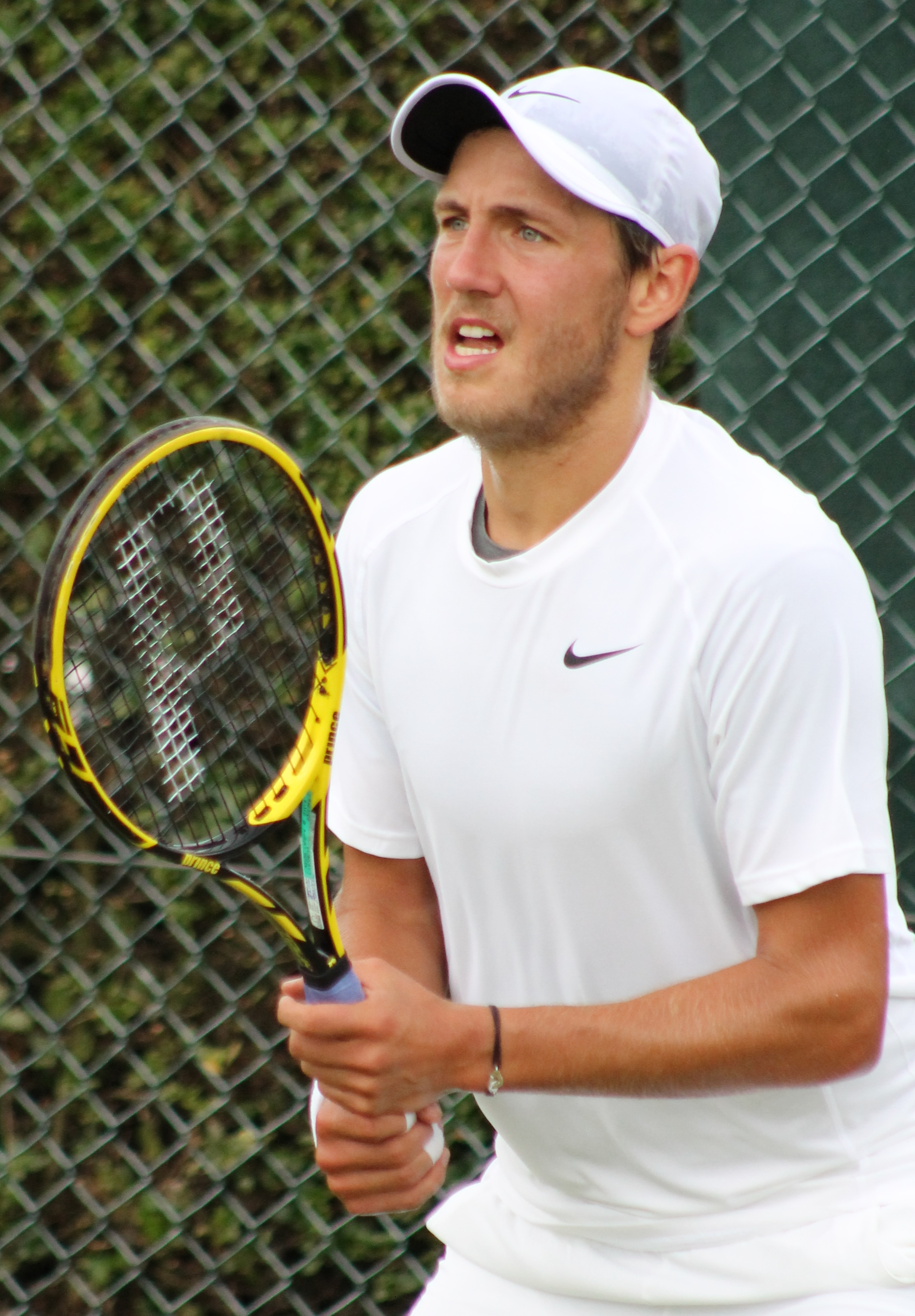 Pouille WMQ14 (3) - Copy